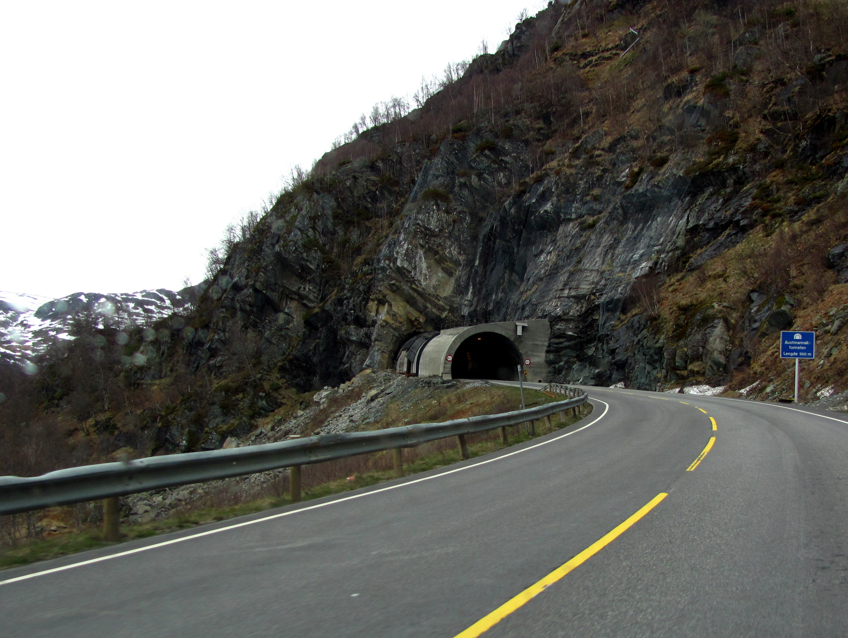 Austmannali-tunnelen på Europavei 134 i Odda kommune i Hordaland fylke. Tunnelen er 903 meter lang og har to kjørebaner.